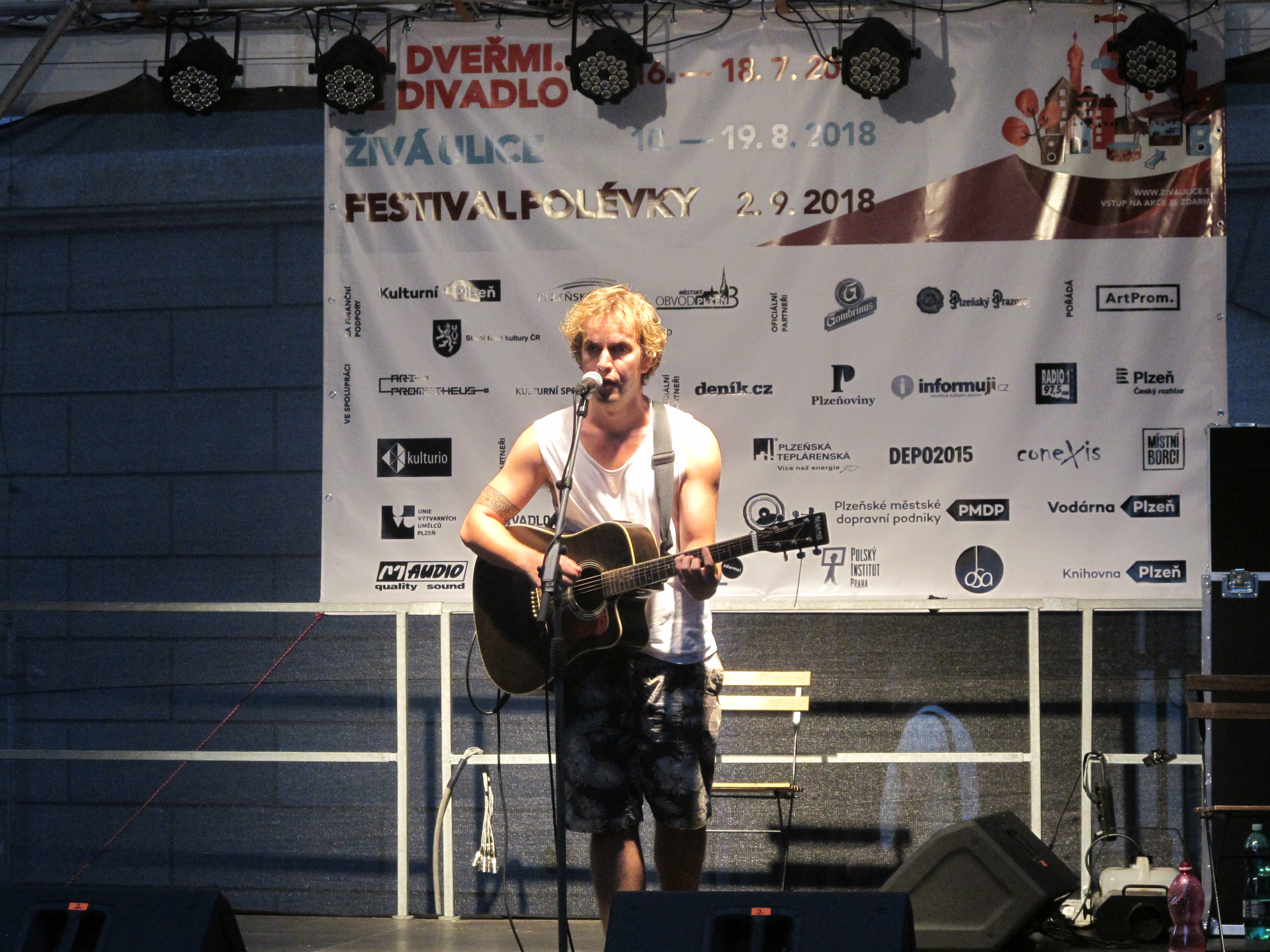 Jakub Čermák během vystoupení na festivalu Živá ulice 2018 v Plzni.